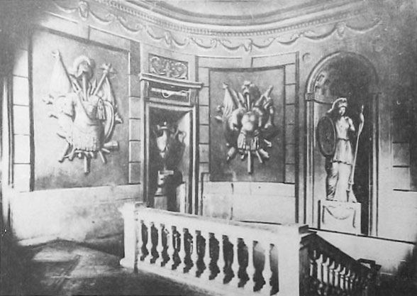 Беларуская (тарашкевіца): Сьвяцак (Śviacak), палац Валовічаў (Vałovič)